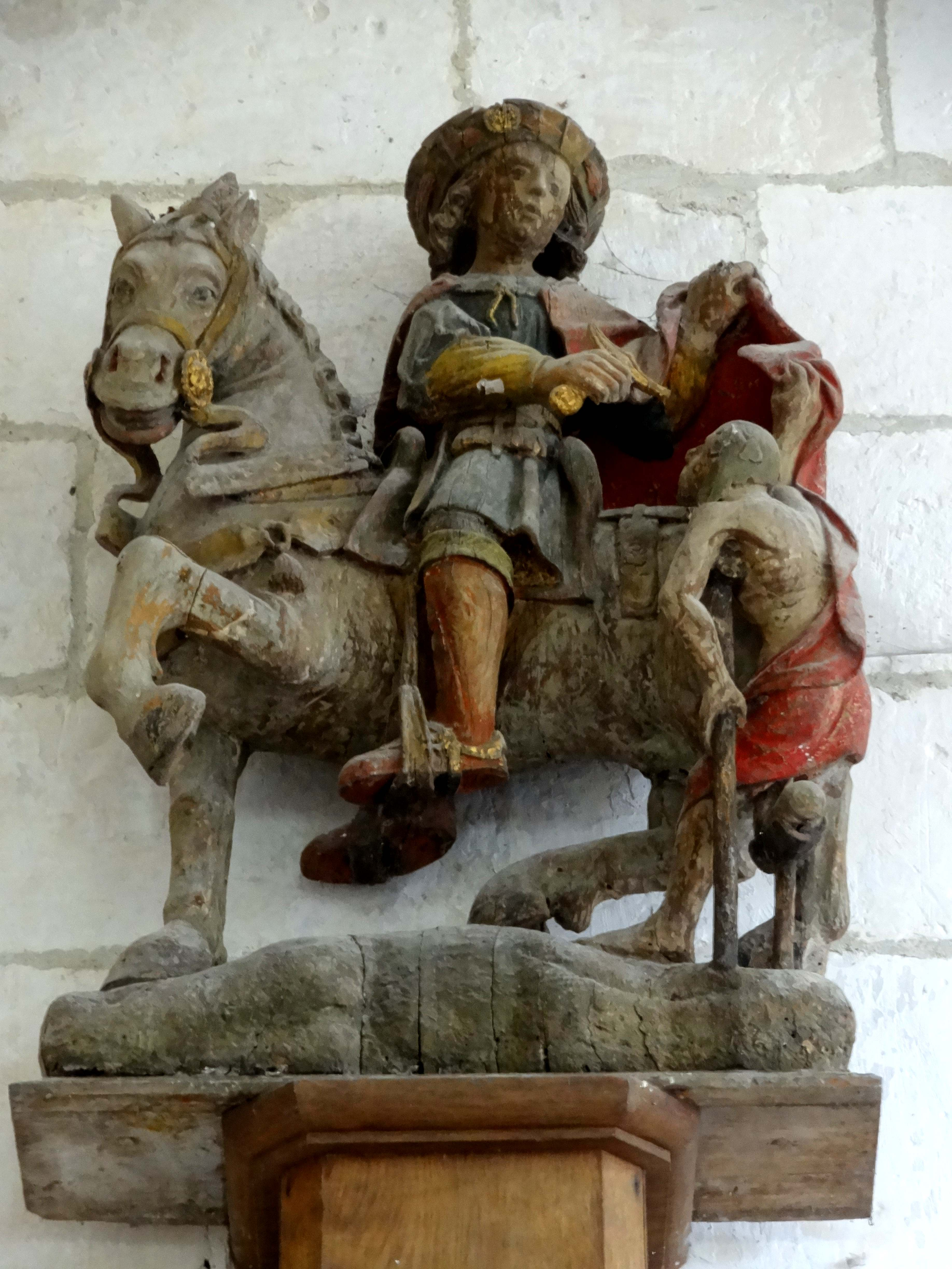 Mobilier de l'église - voir titre.